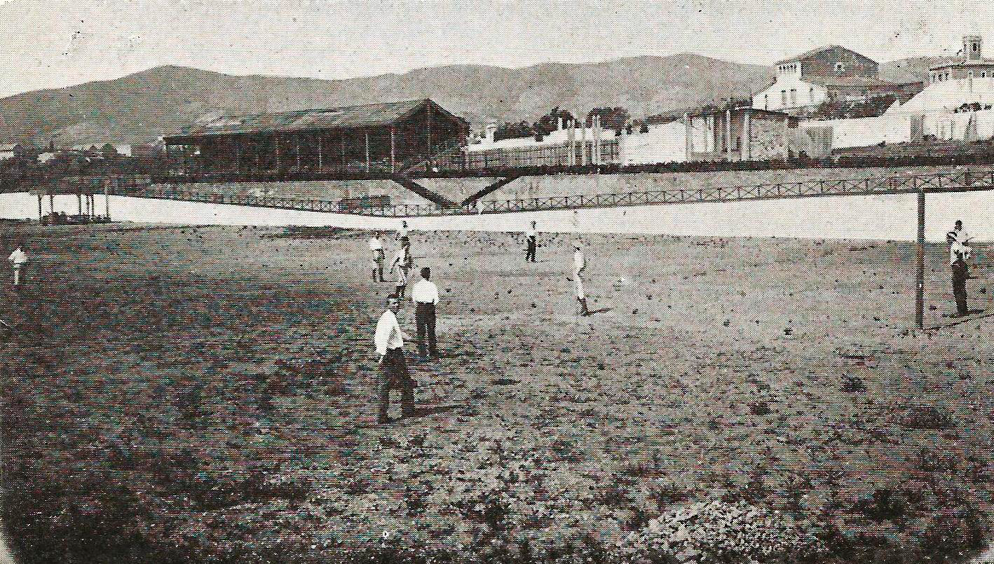 Velòdrom de la Bonanova. Situat entre Via Augusta, Modolell, Valero, J.S. Bach, i Calvet.